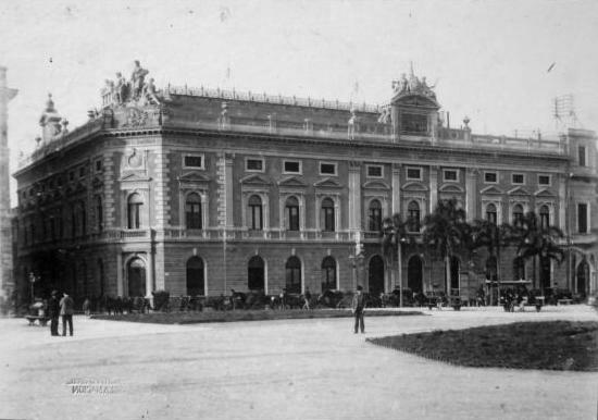 Vista del antiguo edificio del Banco Nacional, luego Banco de la Nación, en Rivadavia y Reconquista. Fue una remodelación del primer Teatro Colón, inaugurado en 1857.